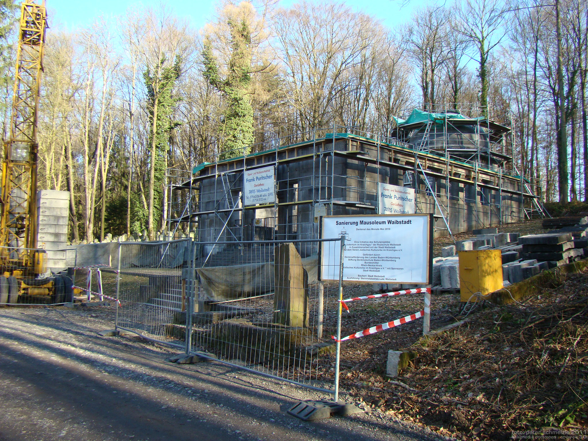 Weil-Mausoleum beim Judenfriedhof Waibstadt, während der Sanierung im Februar 2011